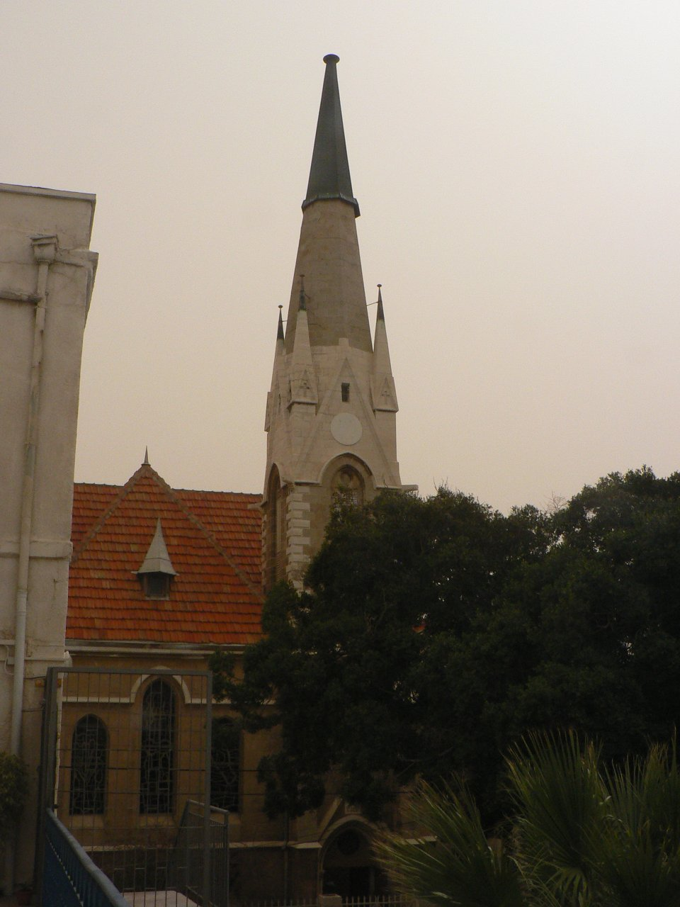 Immanuel Church, Jaffa (Yafo), Israel